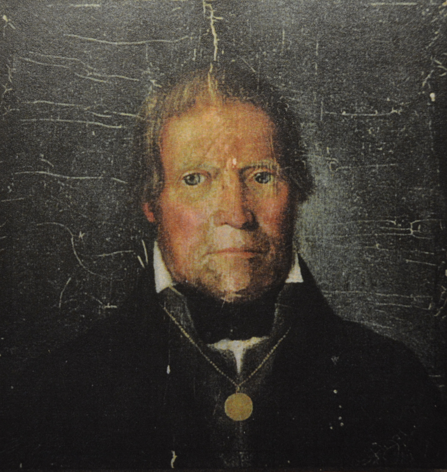 Painting by Mikkel Mandt